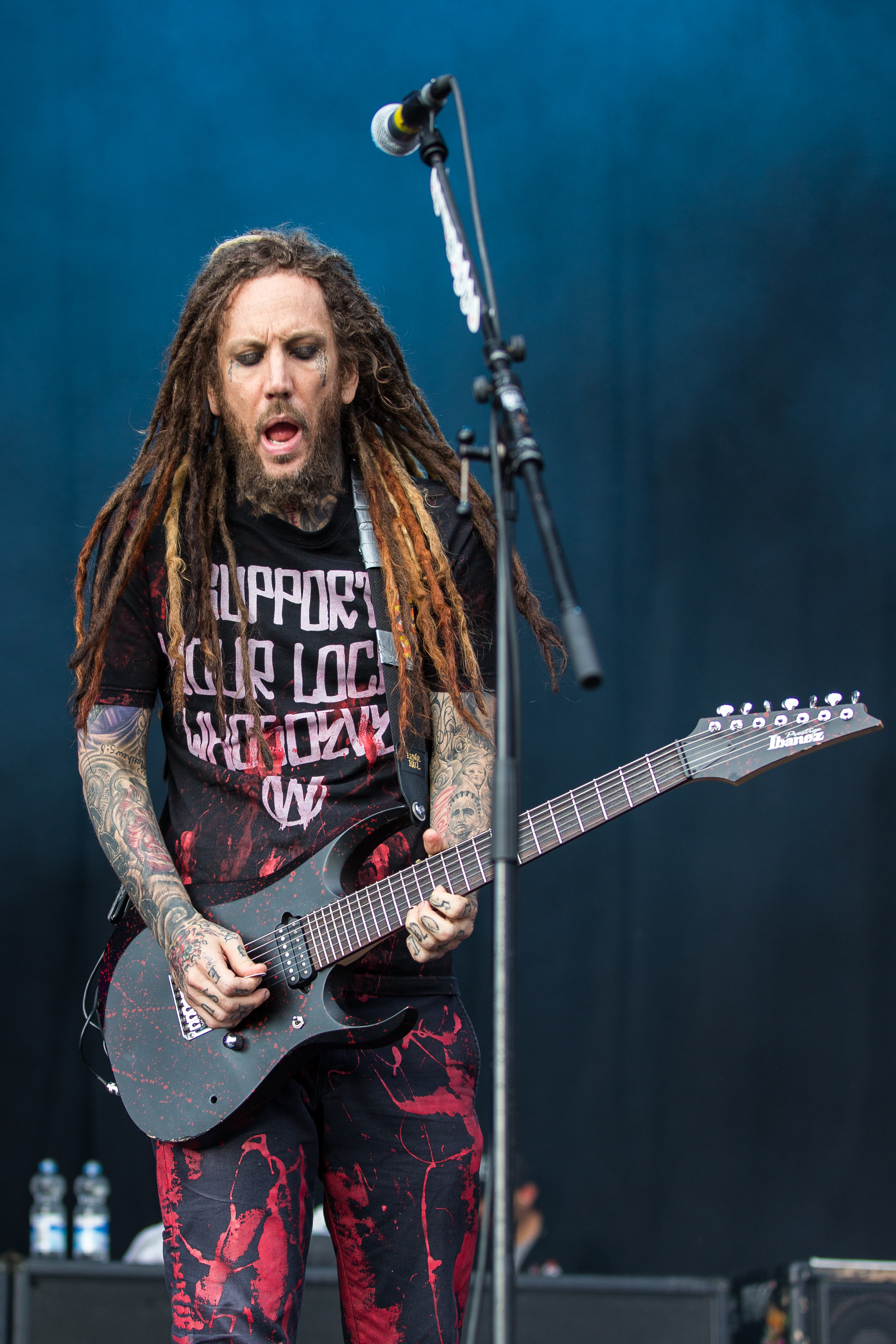 Rock'n'Heim Rock Festival Hockenheim August 2014